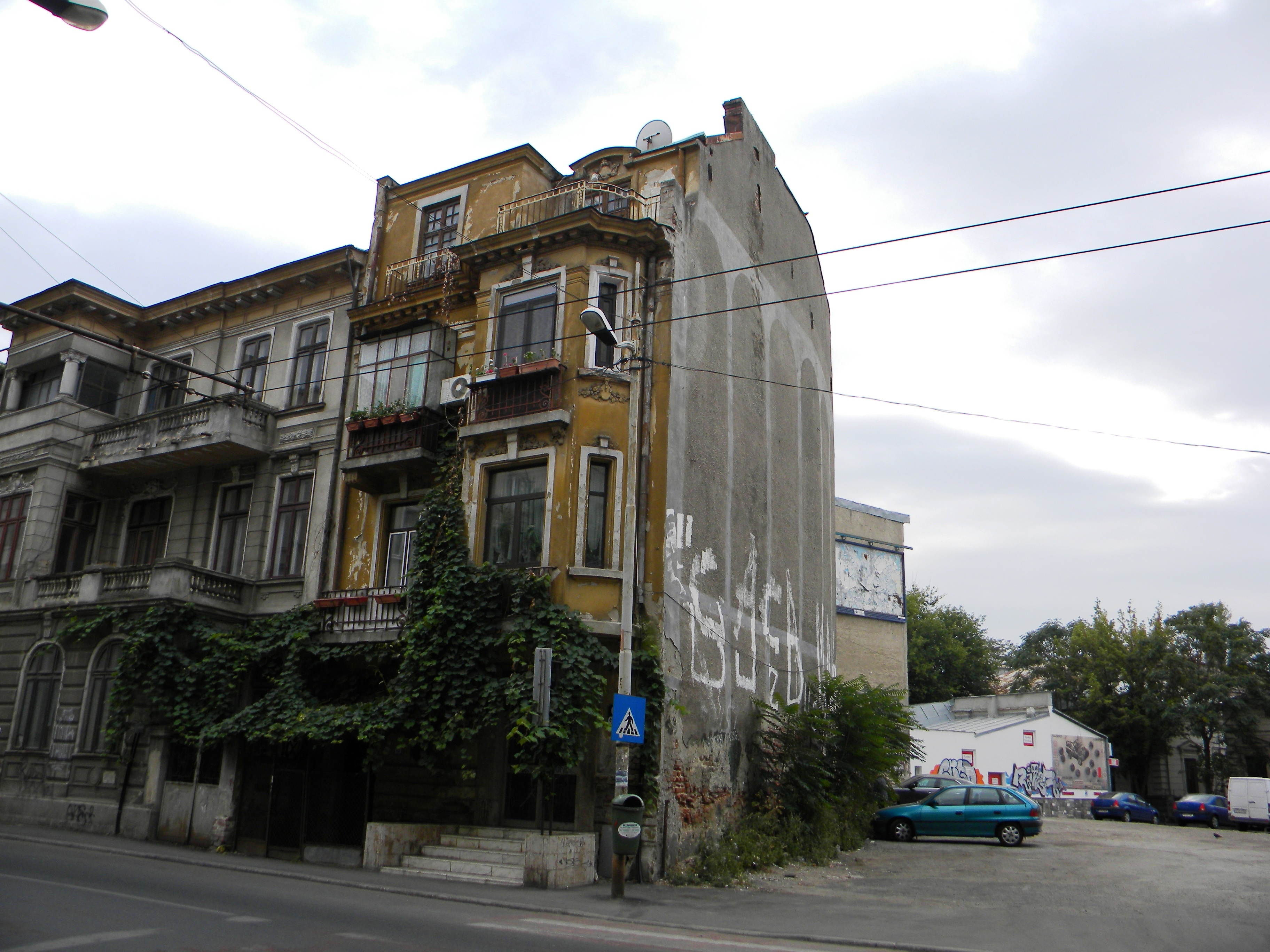 Bucuresti, Romania, Casa pe Calea Grivitei nr. 13, sect. 1 (imagine colt)